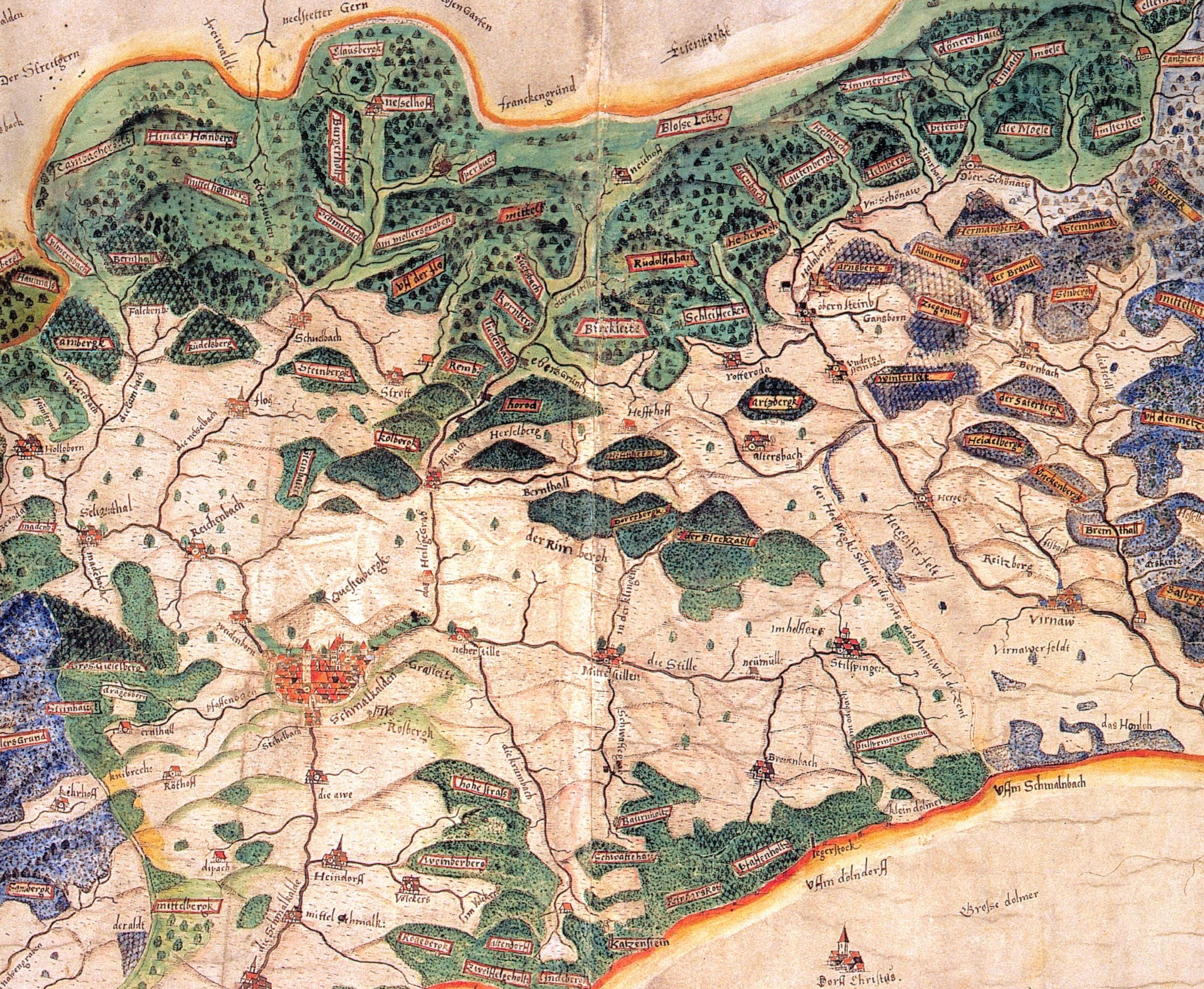 Ausschnitt aus der historischen Karte Wahrhafter Abriss und eigentliche Beschreibung des Amtes Schmalkalden von Joist Moers aus dem Jahre 1589.